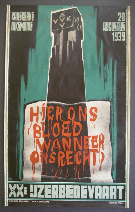 Affiche IJzerbedevaart 1939. Tekst: "Kaaskerke. Diksmuide. 20 augustus 1939. Hier ons bloed, wanneer ons recht? 20e IJzerbedevaart. Uitgaven Bedevaartkomitee Kaaskerke. Vrij van zegel."